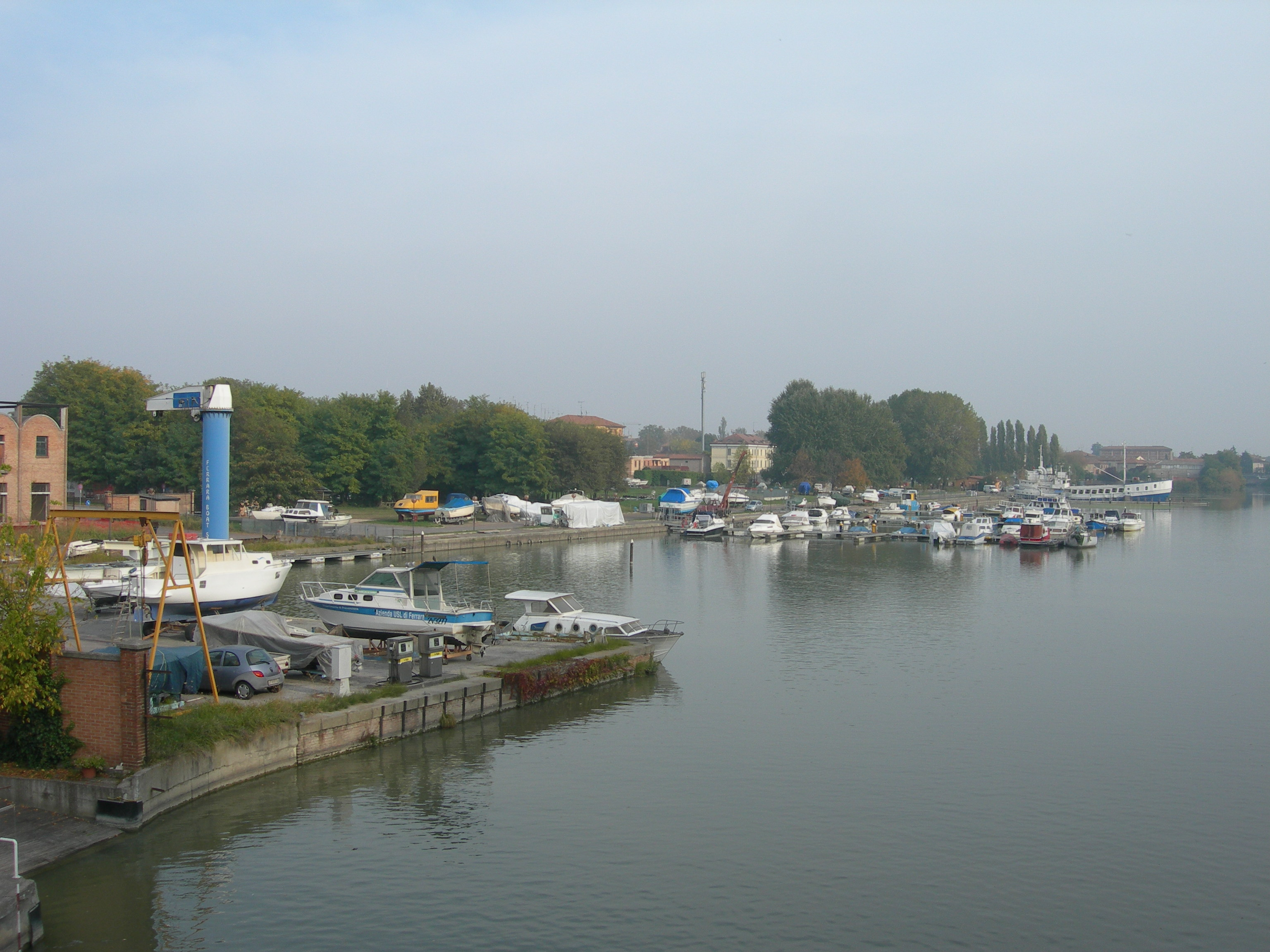 La Darsena a Ferrara.